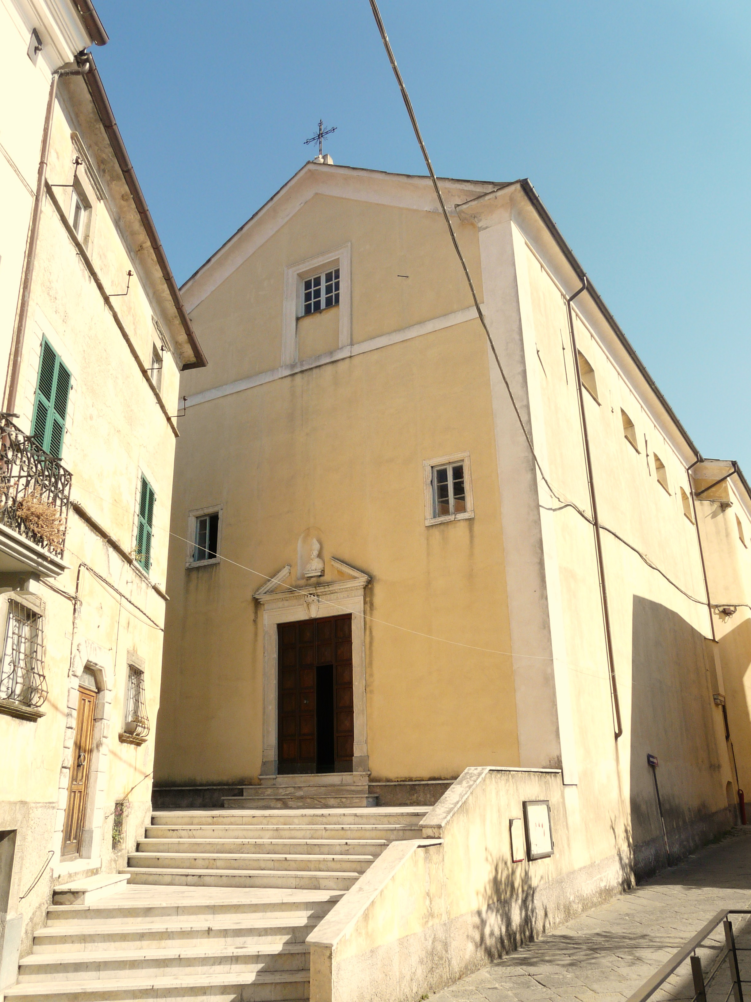 Chiesa-Santuario di San Remigio, Fosdinovo, Toscana, Italia